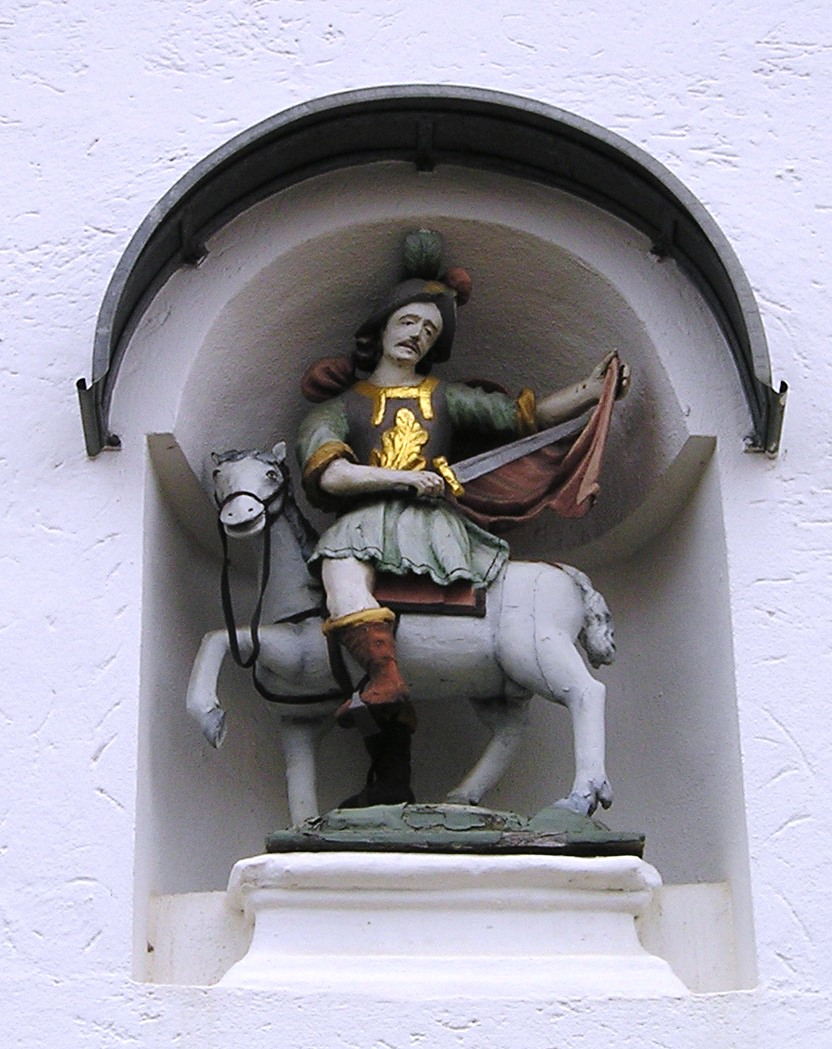 Kirche von Meckenhausen. Landkreis Roth, Figur des hl. Martin über dem Portal